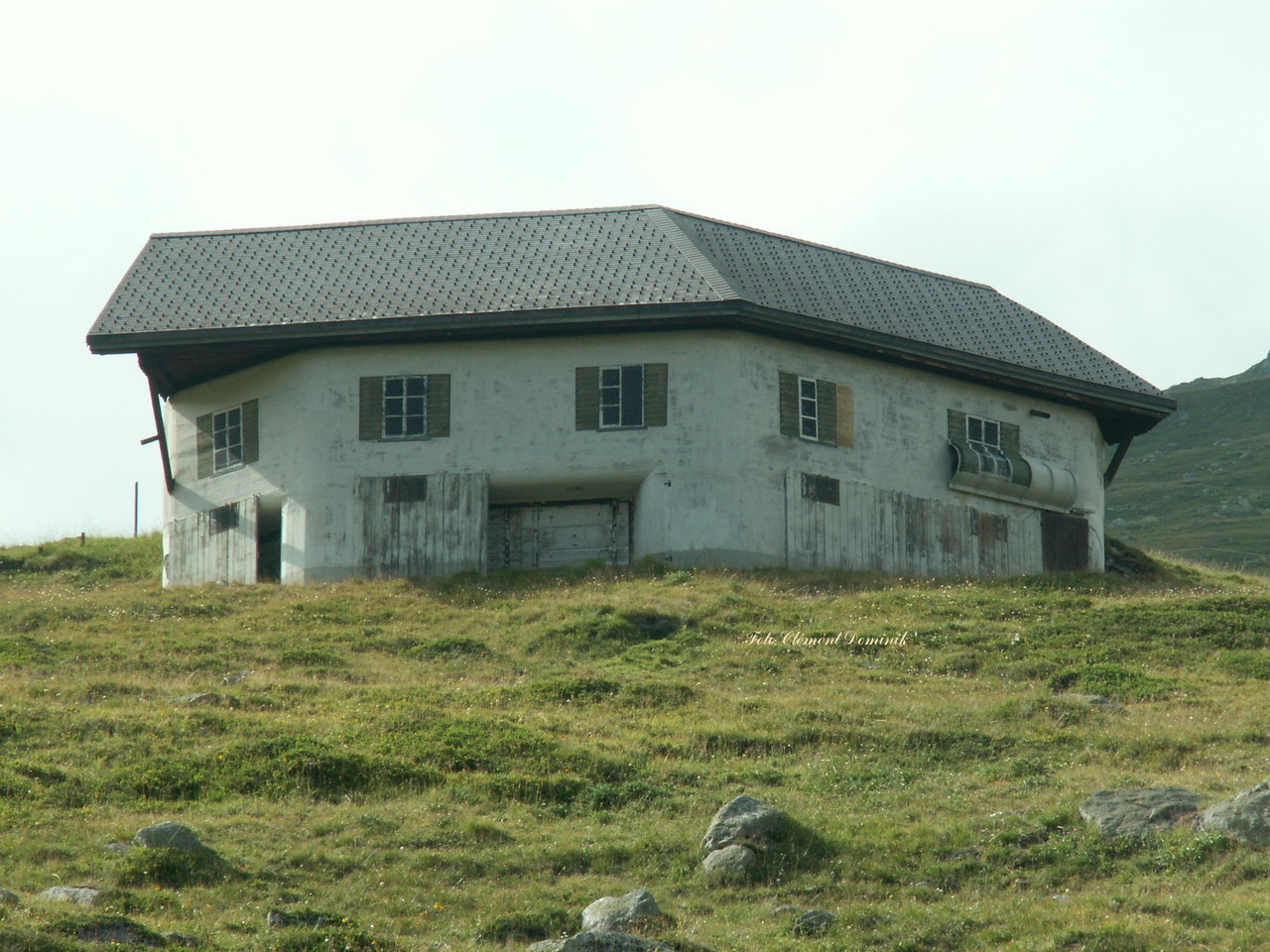 MG Bunker der Anlage Fuchsegg